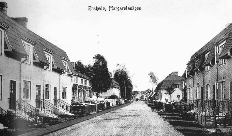 Gamla Enskedets radhus